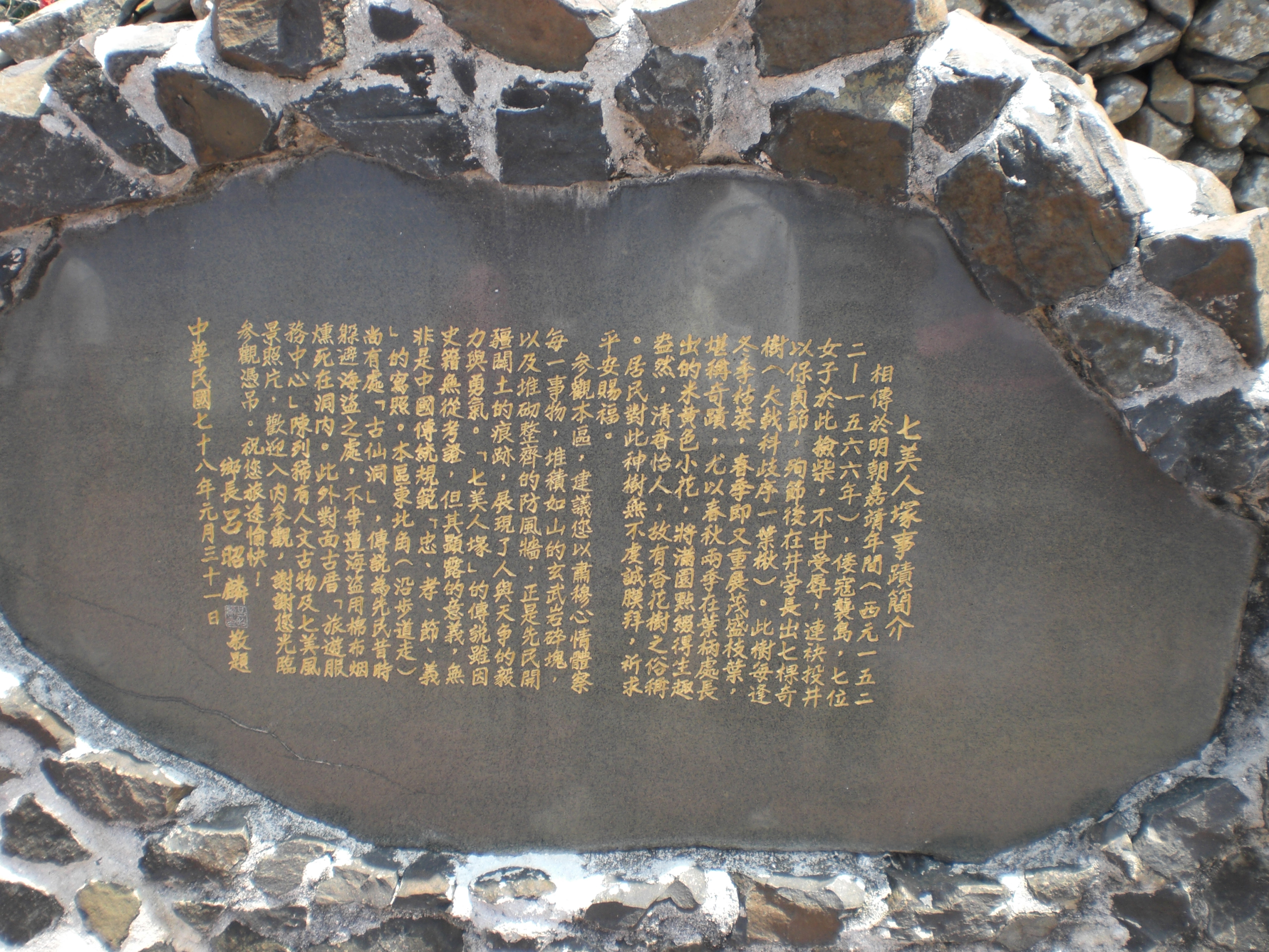 臺灣澎湖縣七美鄉七美人塚事蹟簡介，1989年（中華民國78年）1月31日七美鄉鄉長呂昭麟敬題。